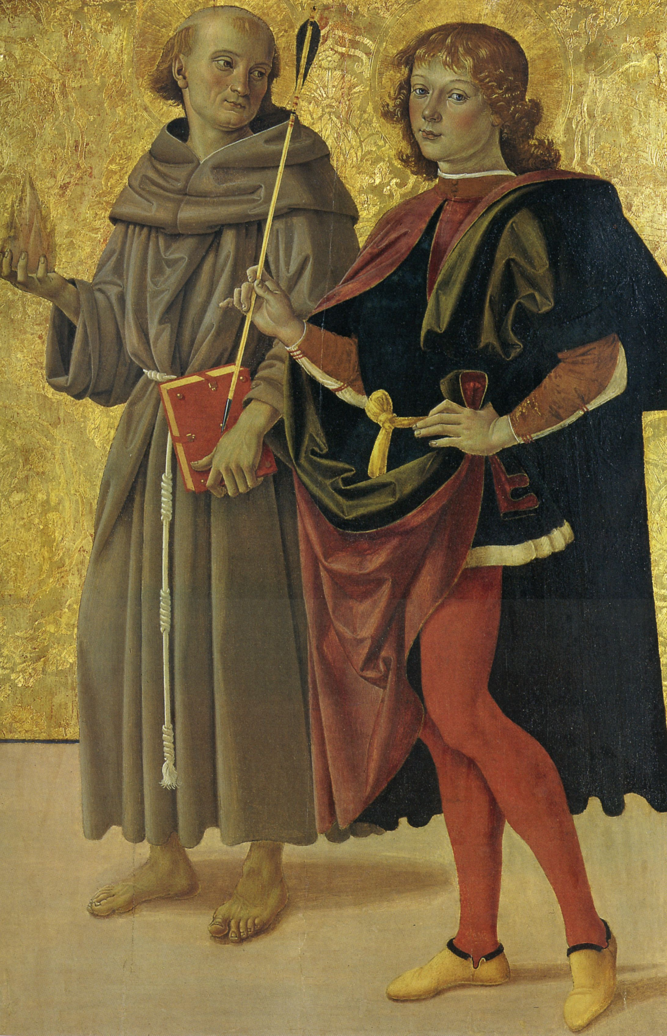 Pietro Perugino: Sant’Antonio da Padova e San Sebastiano. Cat. no. 11 in Vittoria Garibaldi: Perugino. Catalogo completo. Octavo, Firenze 2000, ISBN 88-8030-091-1